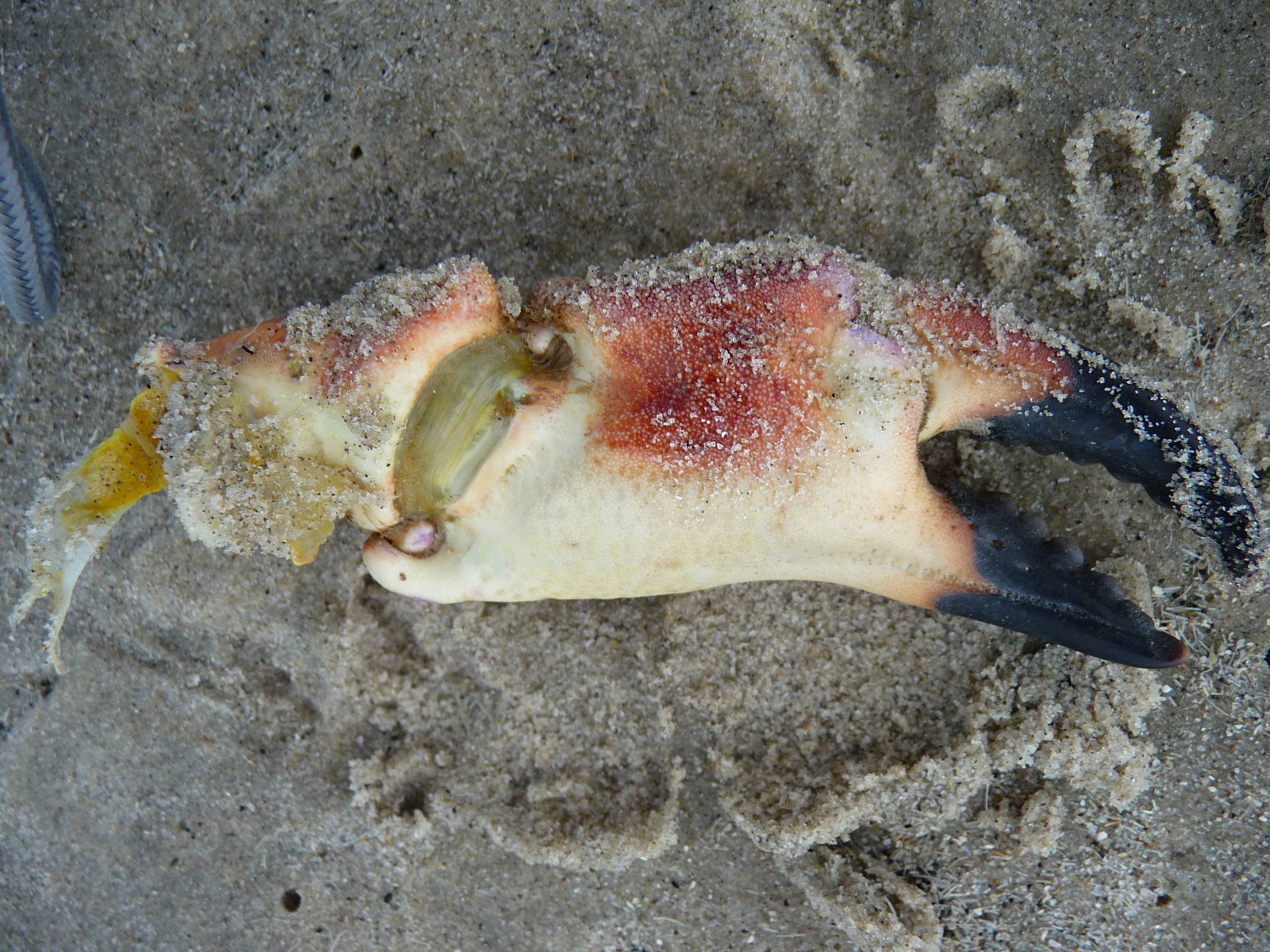 Abgetrennte Schere eines Taschenkrebses (Cancer pagurus), fotografiert auf der ostfriesischen Nordseeinsel Juist (Niedersachsen, Deutschland)